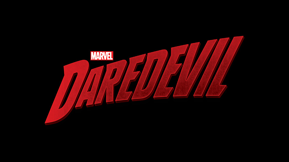 Logo de la série Marvel Daredevil qui sera diffusée sur Netflix en Avril 2015.